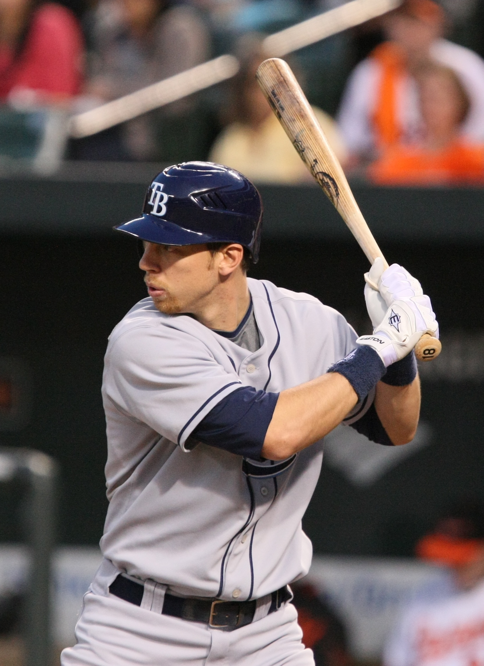 Ben Zobrist